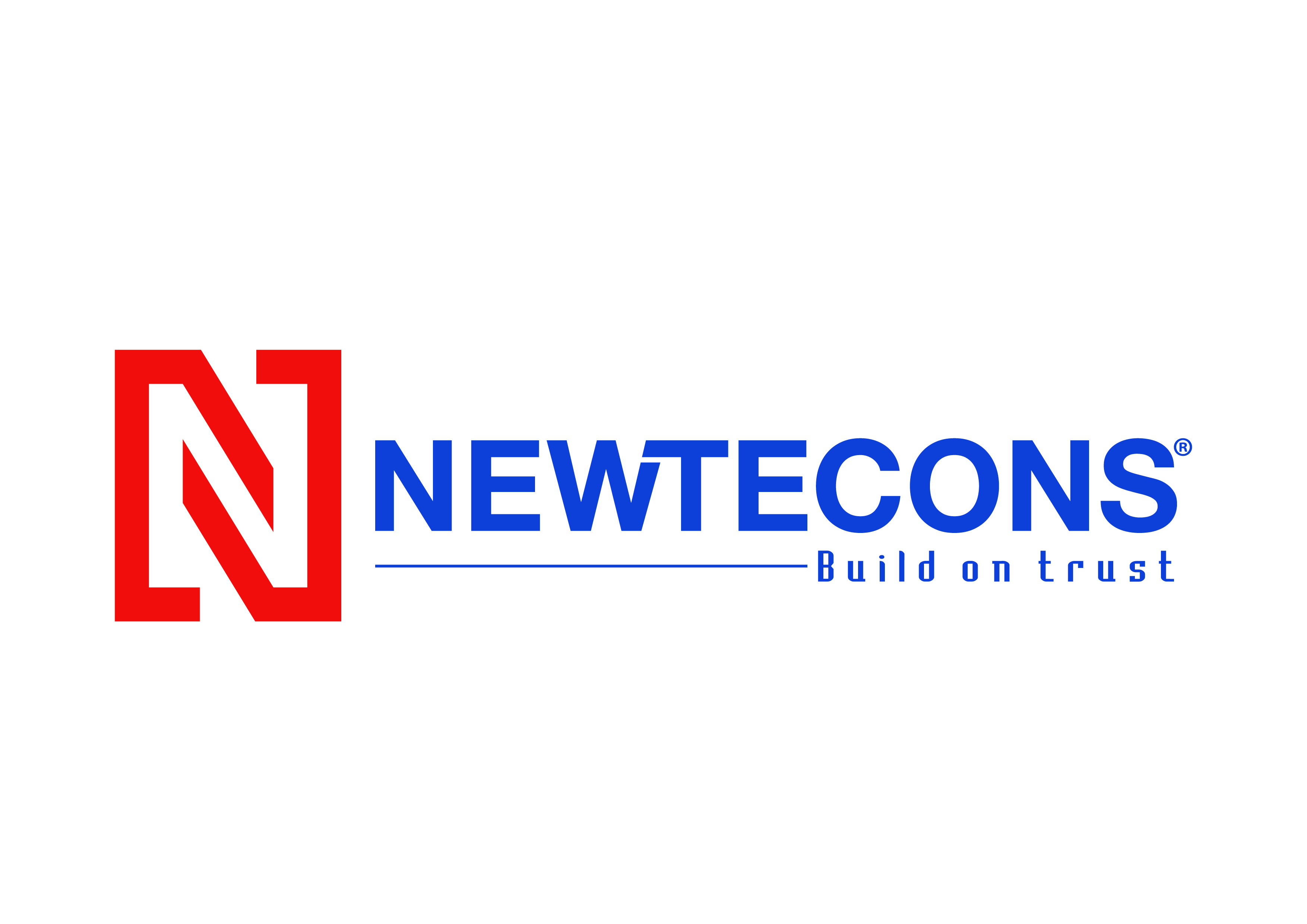 Logo Newtecons